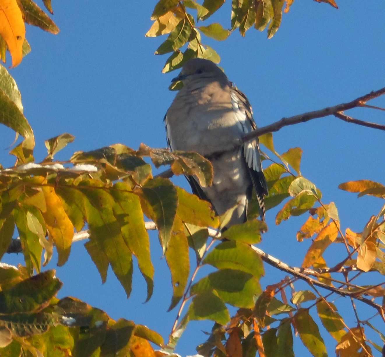 Zenaida asiatica (paloma aliblanca) posada en un Nogal (Carya illinoinensis) en un día nevado en la ciudad de Chihuahua.